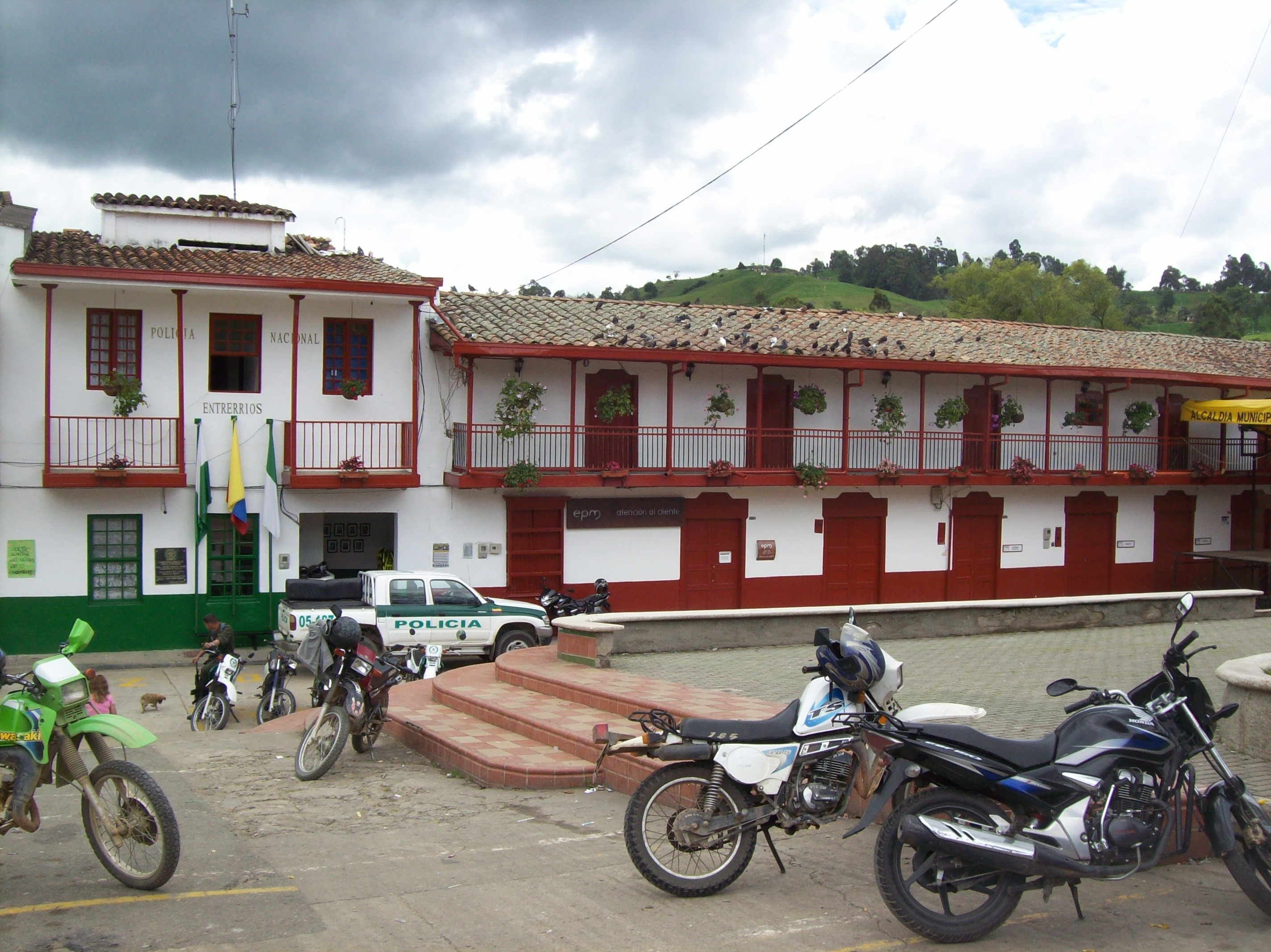 Alcaldía y estación de policía del municipio de Entrerríos, Antioquia, Colombia.